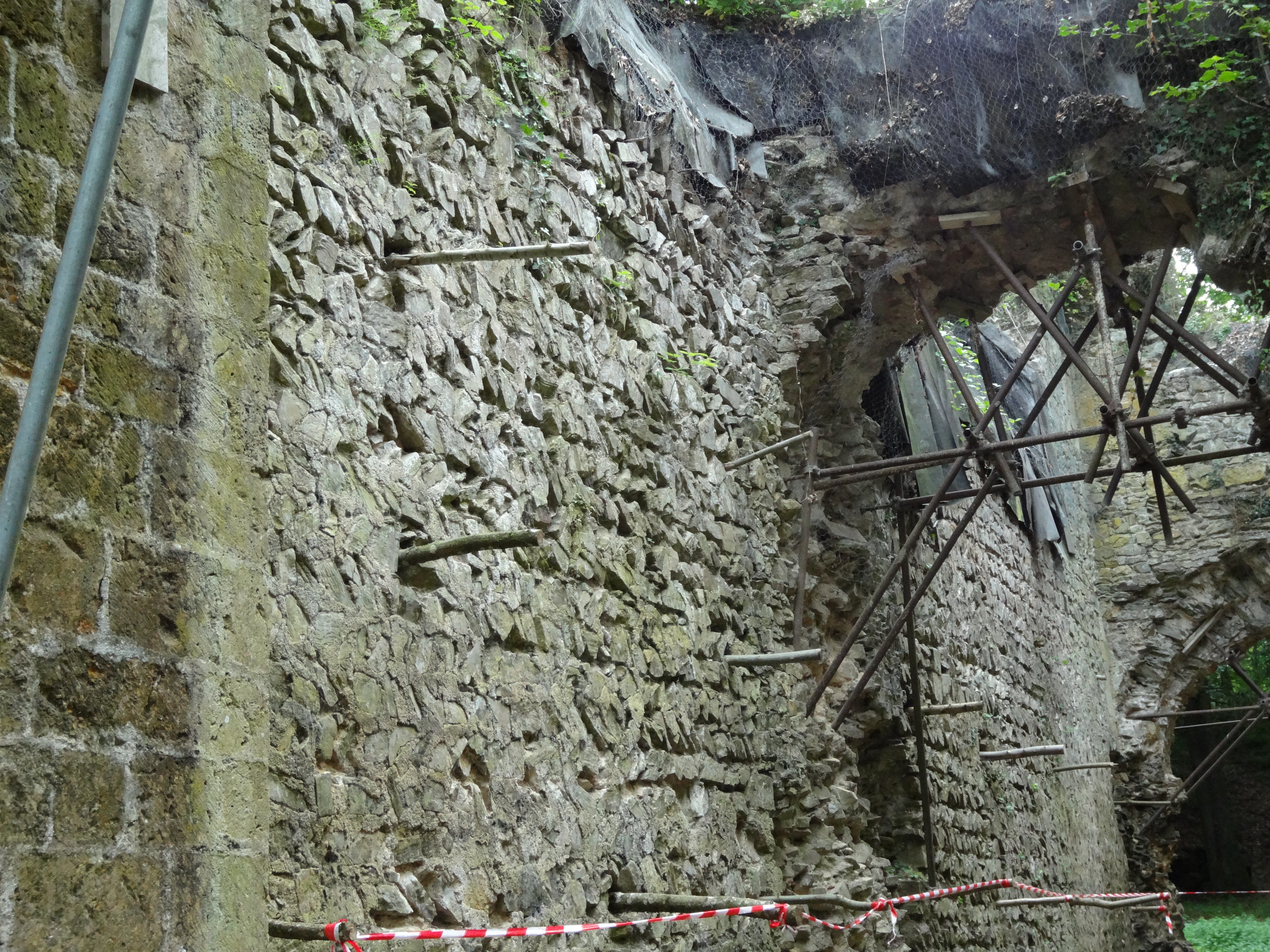 La Pommeraye (Calvados) Château Ganne, mur sud de la tour porche donnant accès à la haute cour partiellement en arête-de-poisson